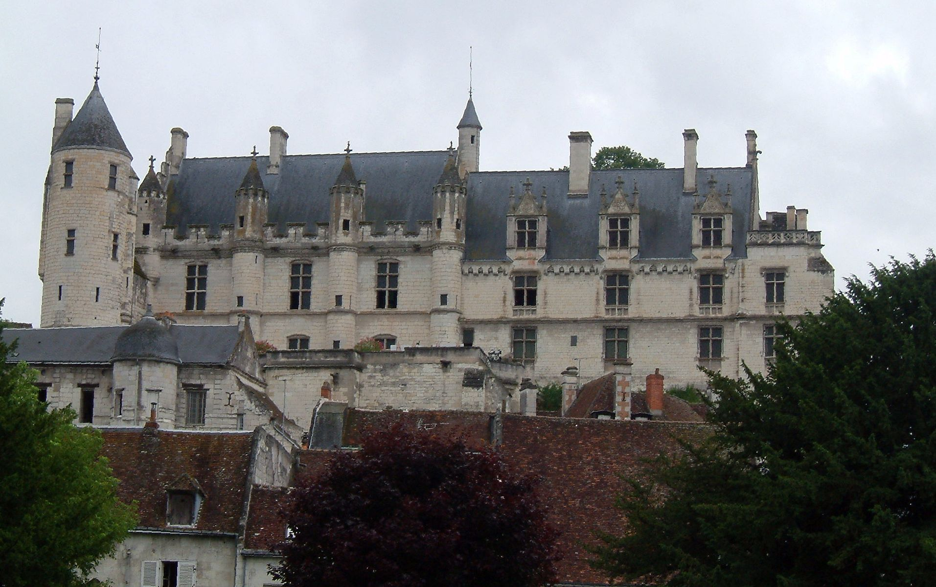 Château de Loches, Loches, FRANCE